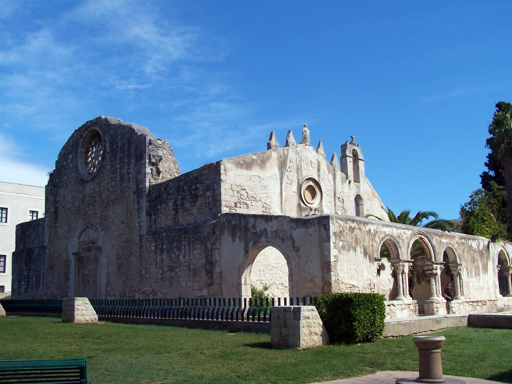 Chiesa di San Giovanni Evangelista a Siracusa.